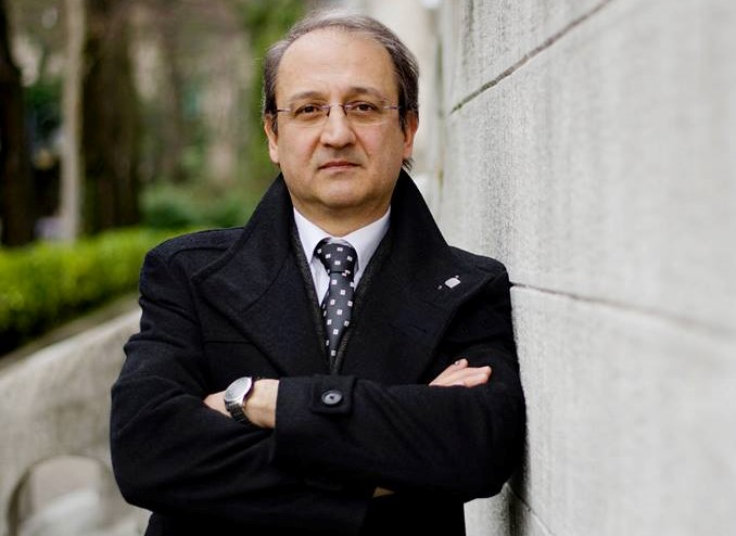 Pietro Neglie, storico italiano.